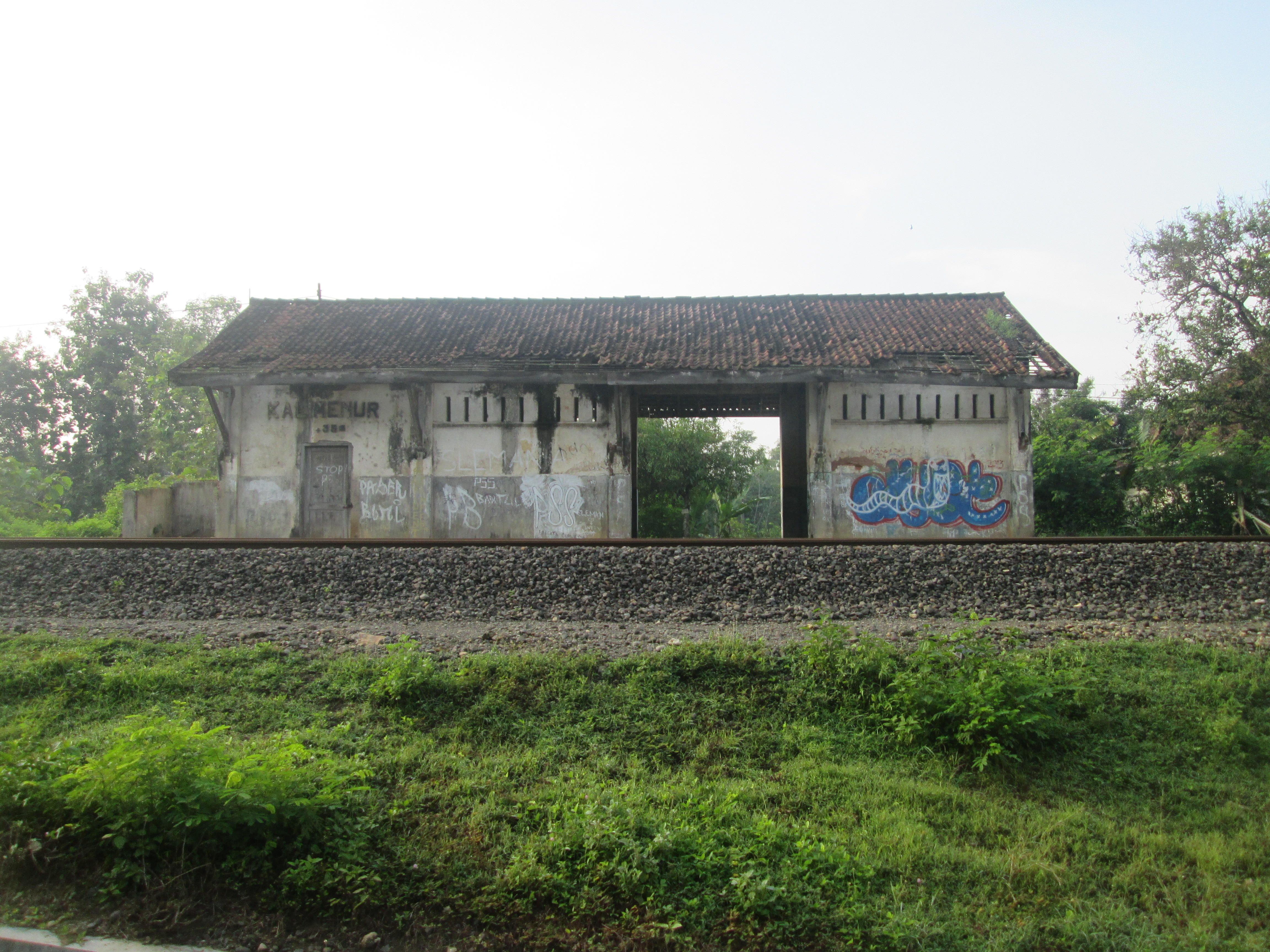 Kondisi stasiun Kalimenur, 21 Februari 2016